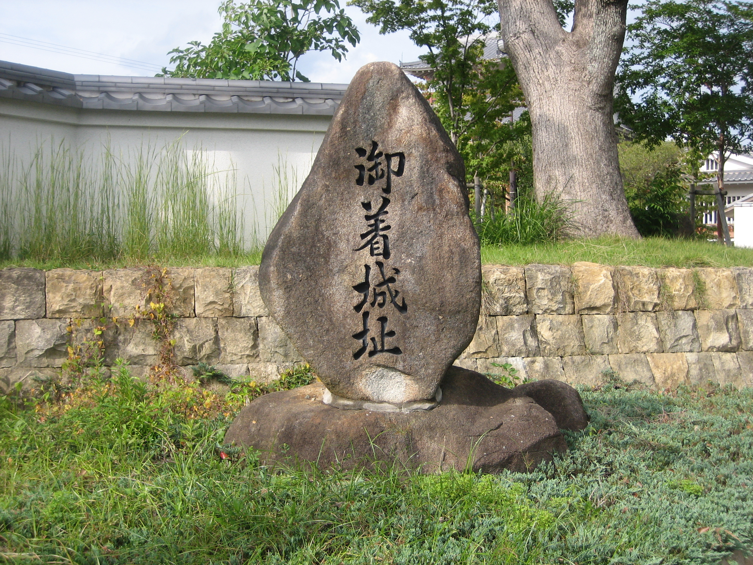 御着城跡地に立つ石碑。日本の戦国時代に兵庫県姫路市東部に存在した城。